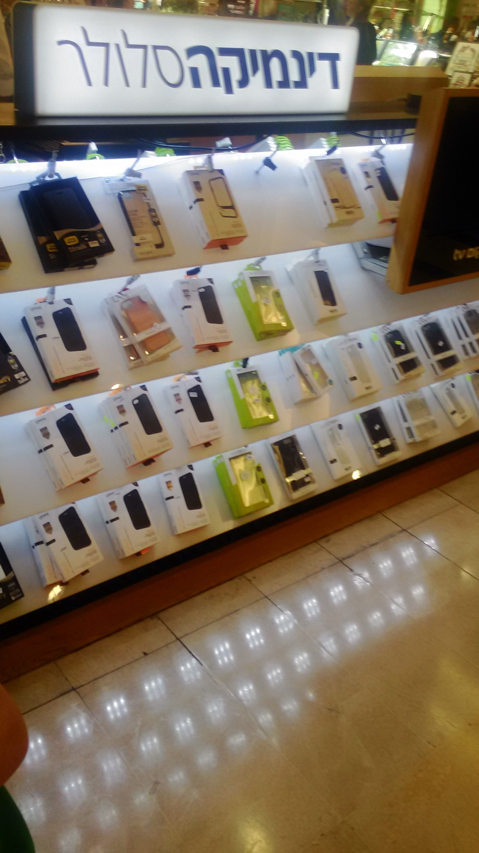 סניף דינמיקה סלולר